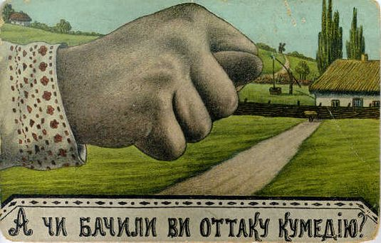 Василий Гулак. "А чи бачили вы оттаку кумедию?" Почтовая карточка Российской Империи.